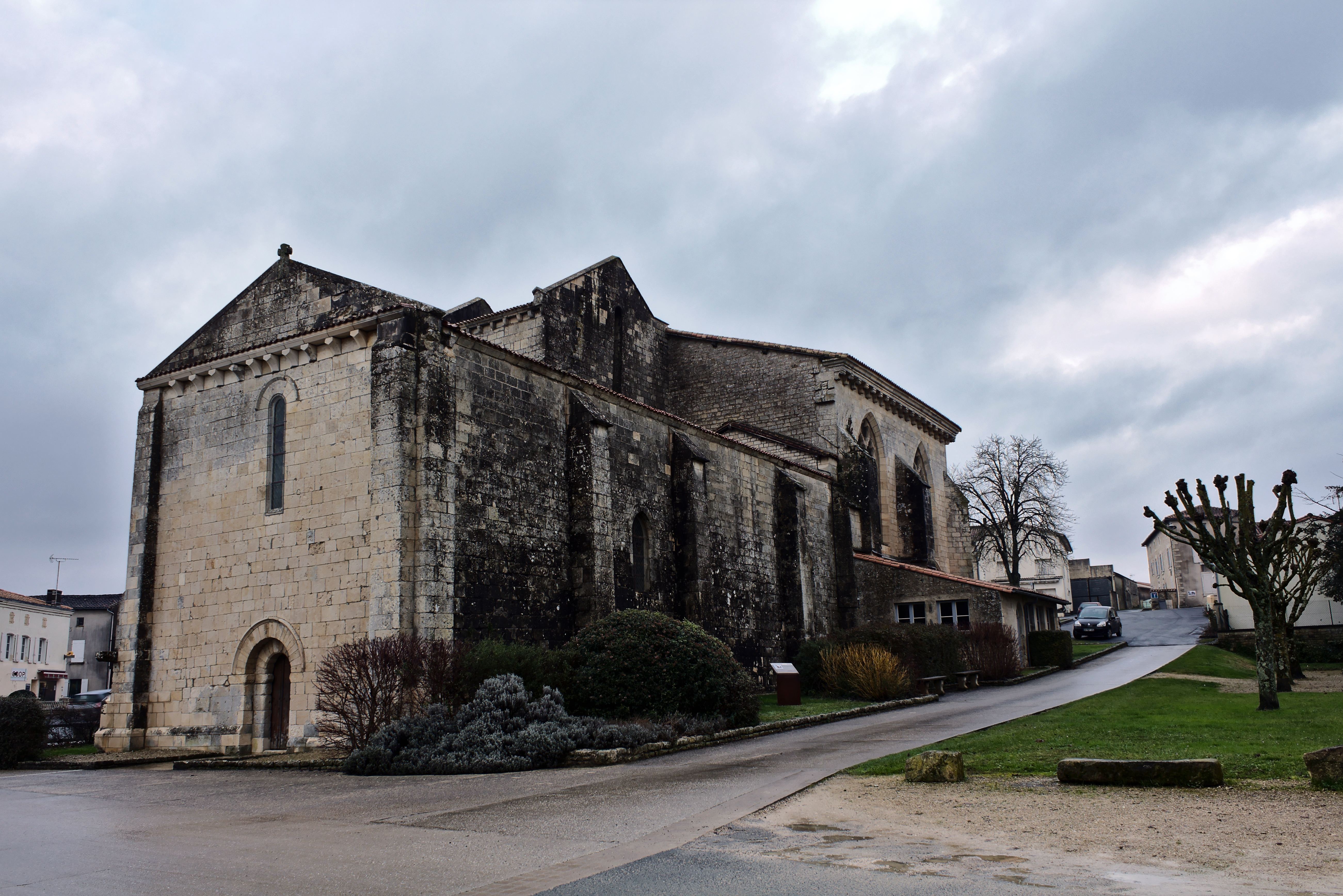 Église Saint-Martin de Périgné.